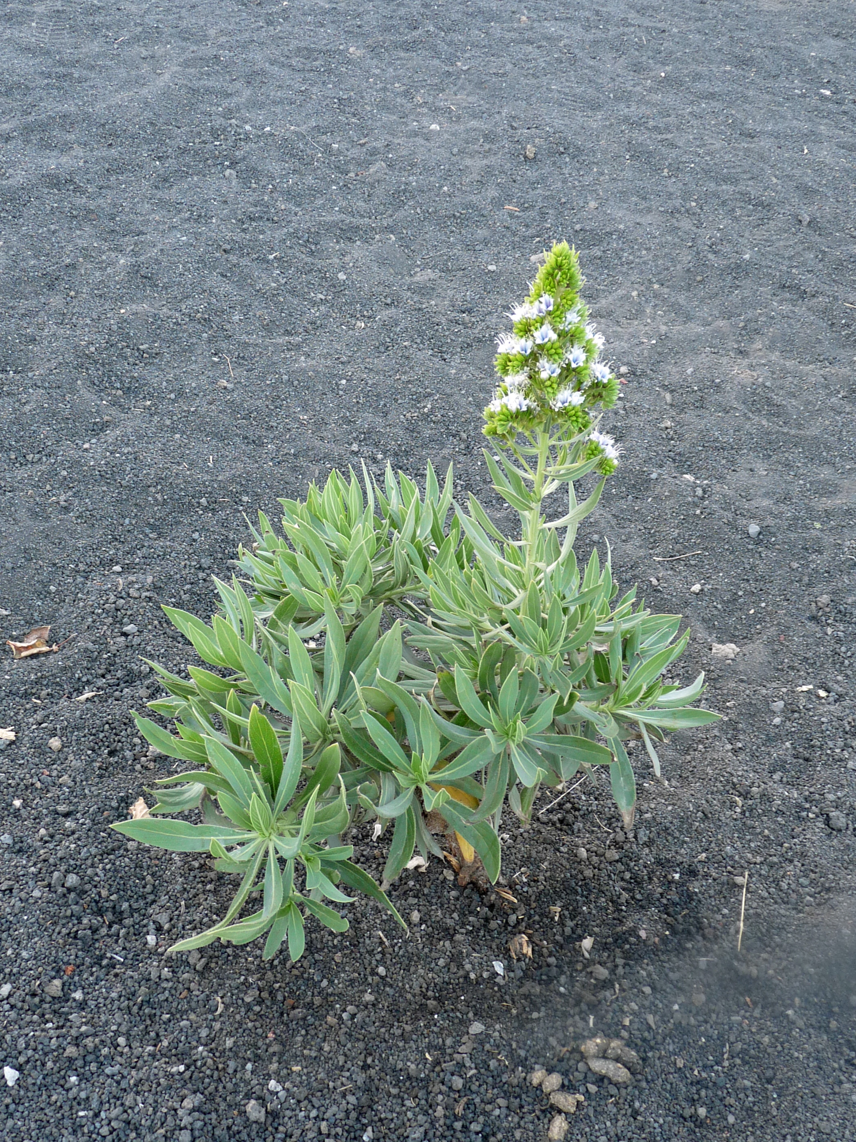 Chã das Caldeiras : Echium vulcanorum (Lingua-de-Vaca), espèce endémique de l'île de Fogo (Cap-Vert)